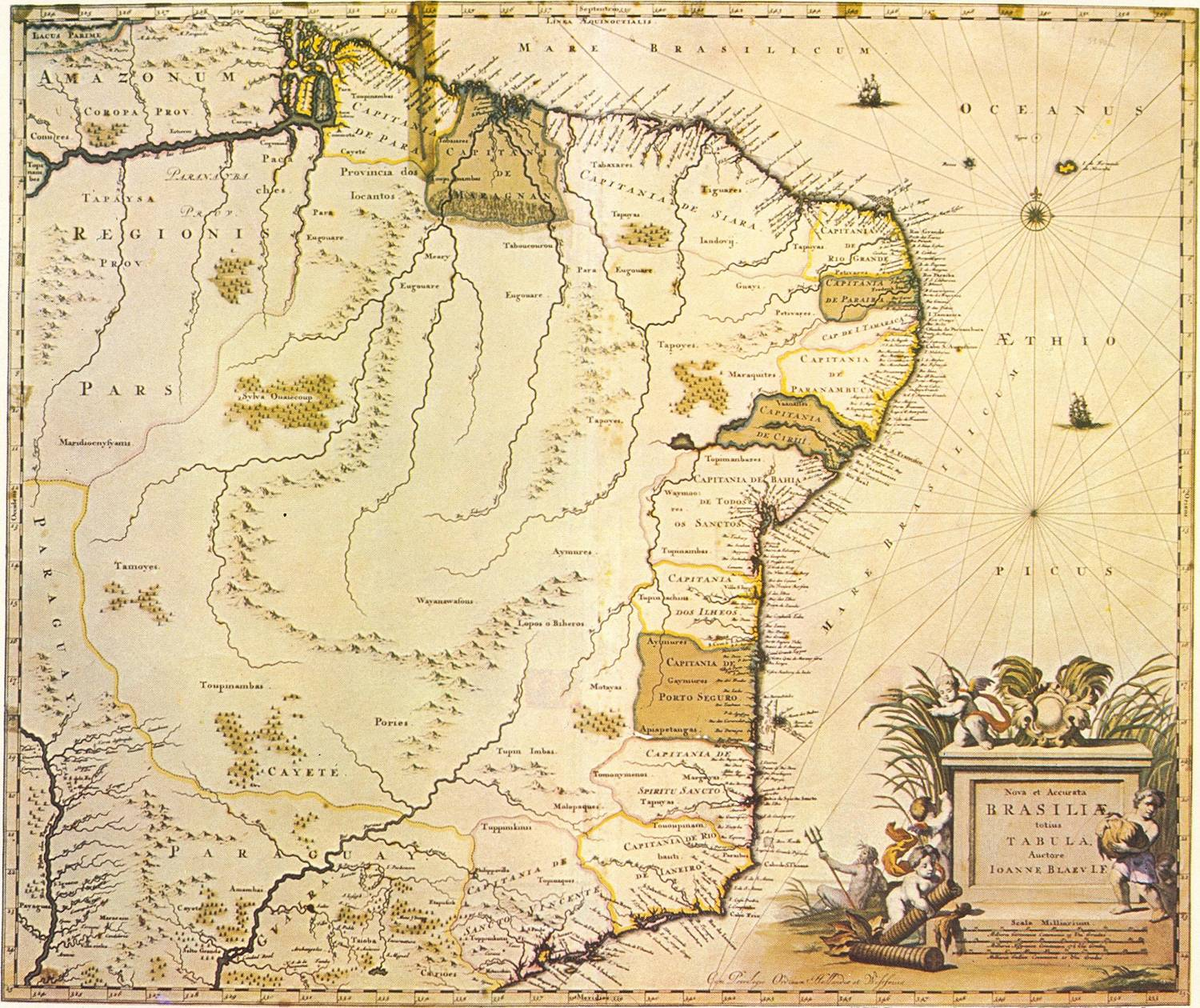 Nova et Accurata Brasiliae Totius Tabula feita em 1640 por Joan Blaeu. Mostram-se as capitanias na costa brasileira, numa organização diferente da estabelecida na primeira metade do século XVI.